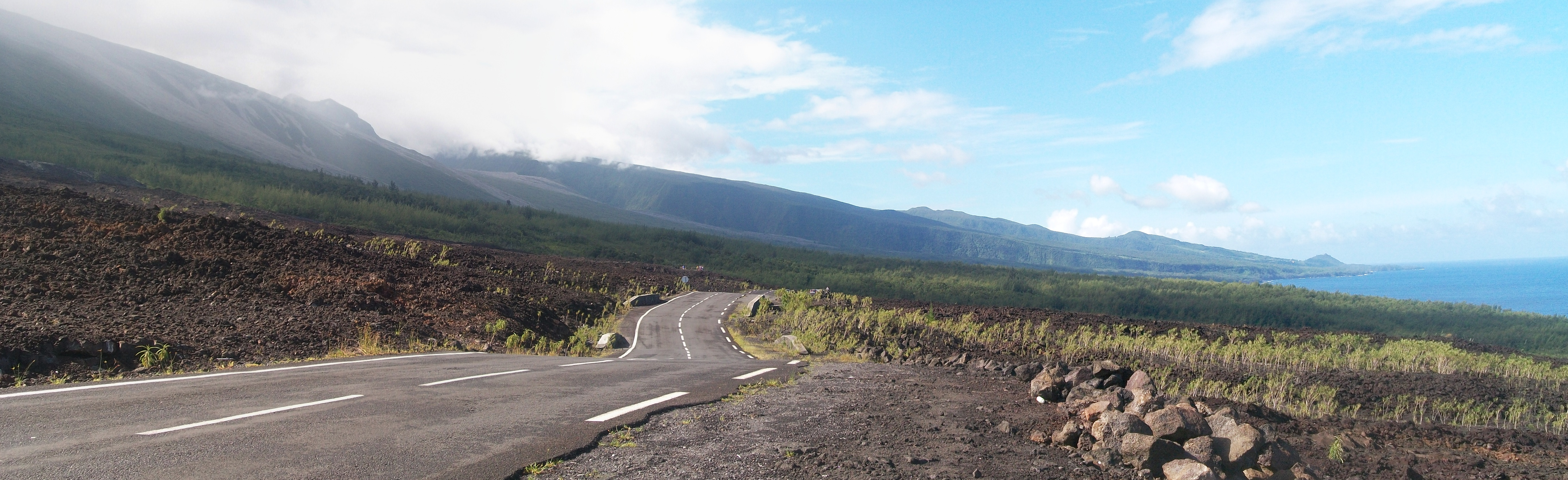 panorama sur la coulé de 2007